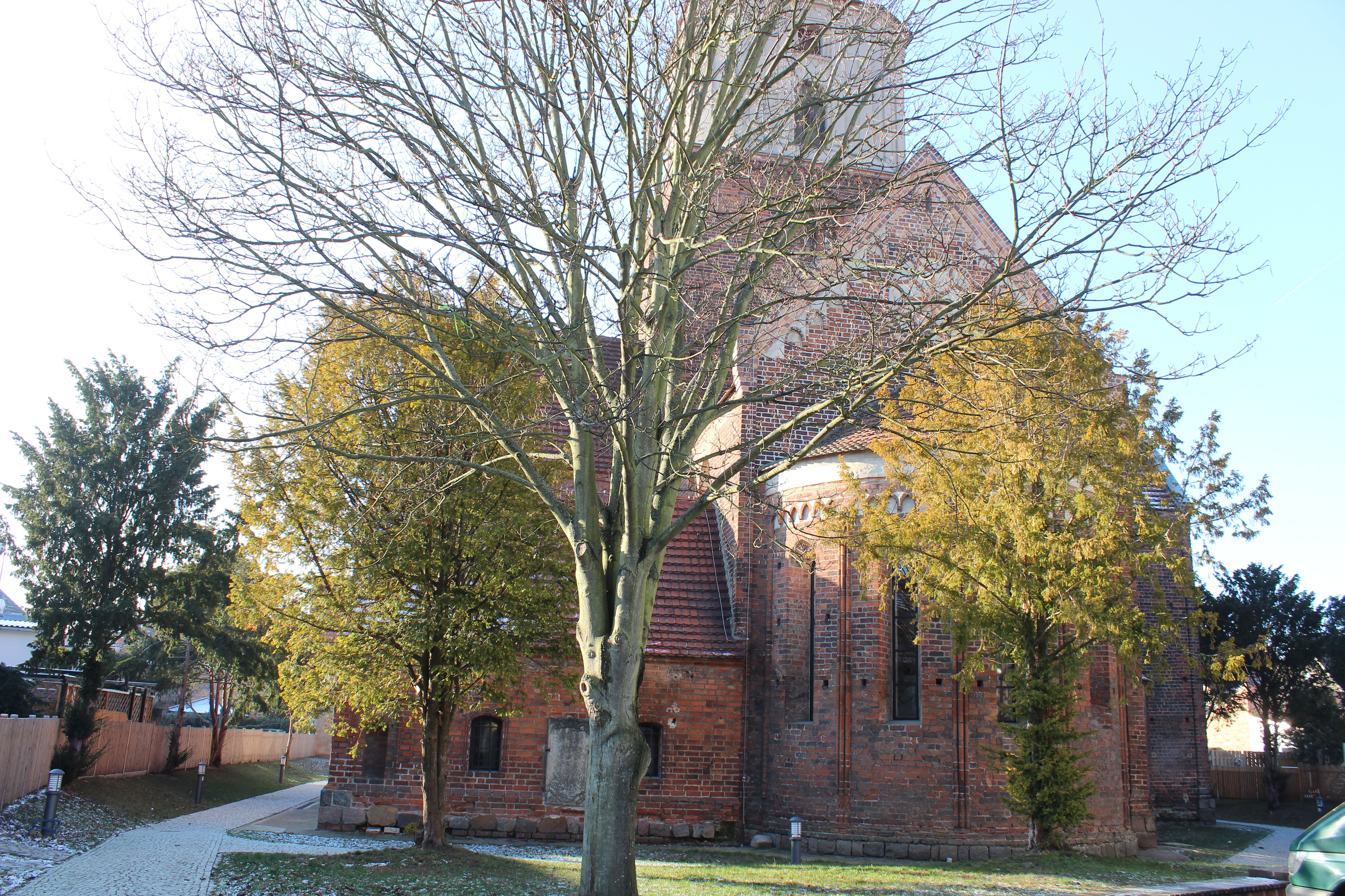 Gestaltung des Ostteils des Geländes der St.Nikolai Kirche in Treuenbrietzen